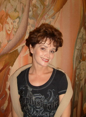 Frankó Tünde opera-énekesnő